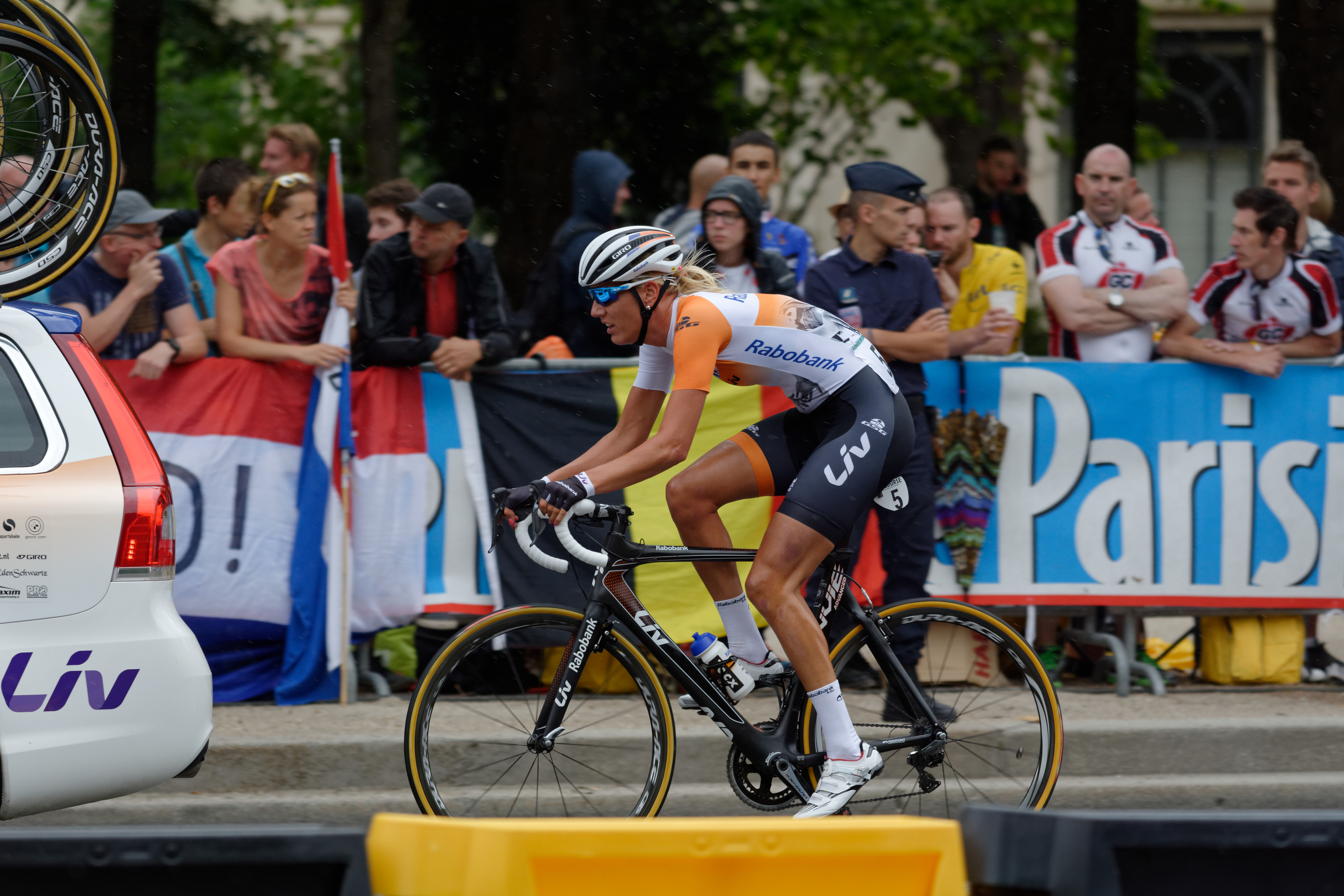 D71_1675_DxO